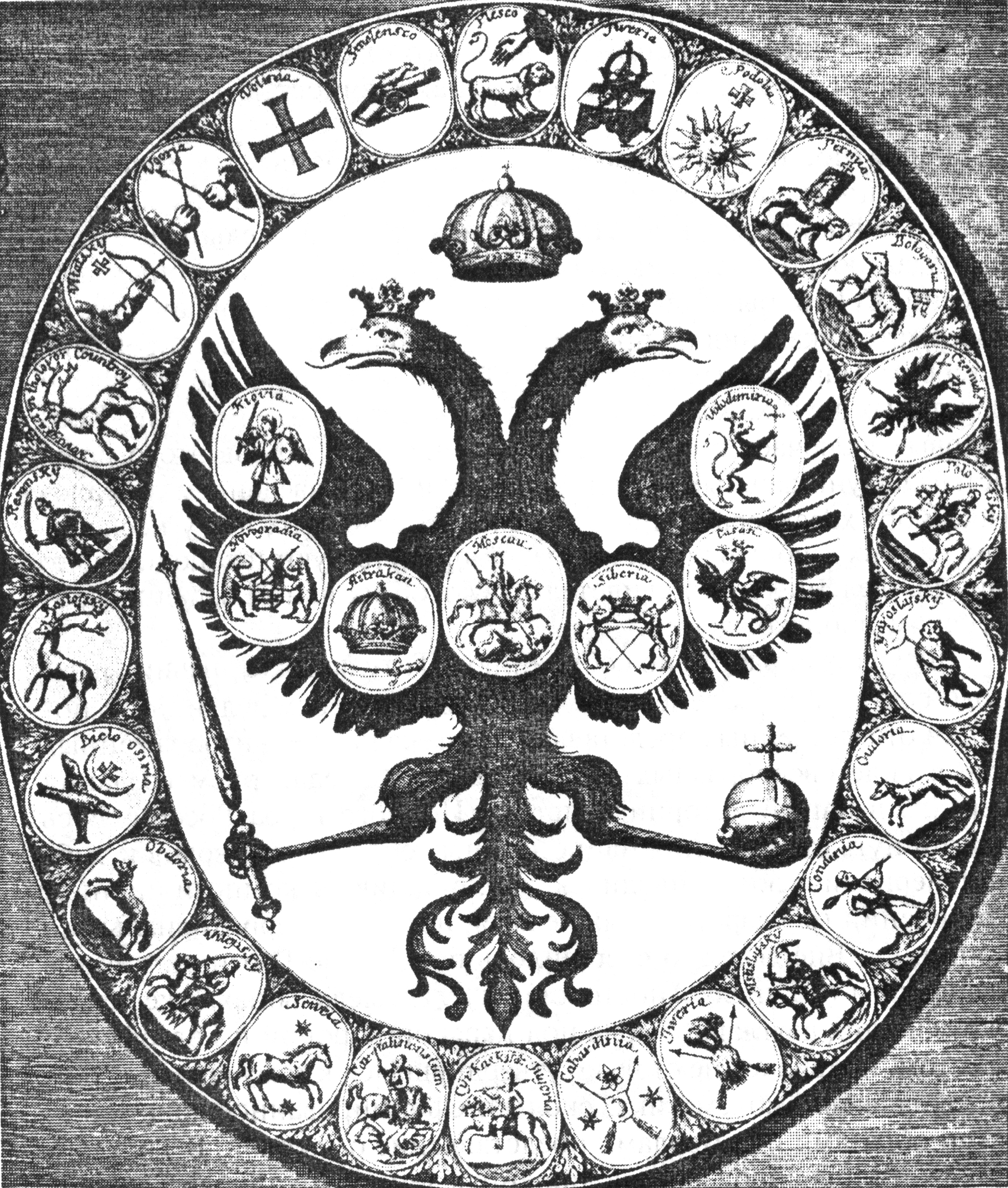 Герб России в дневнике Корба. 1699 г.